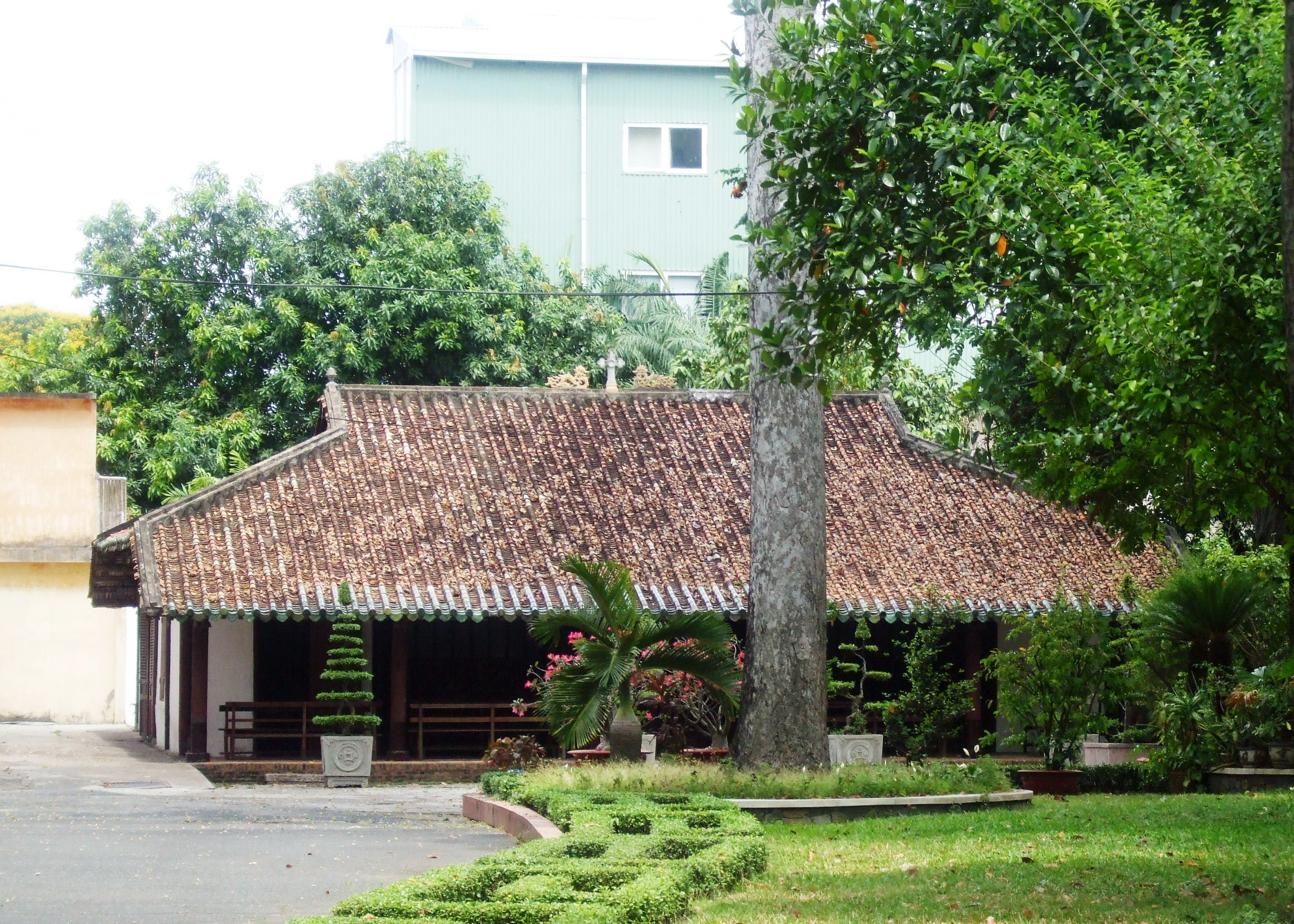 Nhà nguyện Giám mục Bá Đa Lộc, hiện tọa lạc trong khuôn viên Tòa Giám mục TP. Hồ Chí Minh. Ngoài giá trị lịch sử, đây còn là một trong số rất ít ngôi nhà cổ còn tồn tại ở Thành phố Hồ Chí Minh.